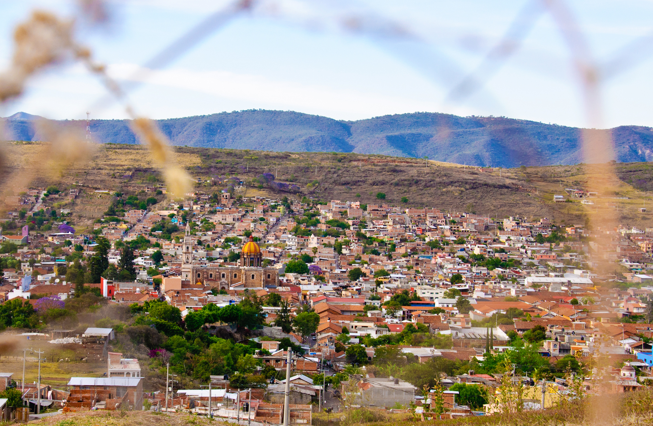 Fotografía tomada por Carlos Torres Espinoza puesta a su disposición con el requerimiento de mencionar los créditos correspondientes. Bello atardecer en la ciudad de Cotija de la Paz Michoacan México. desde el conocido "mirador" Abril 2012.